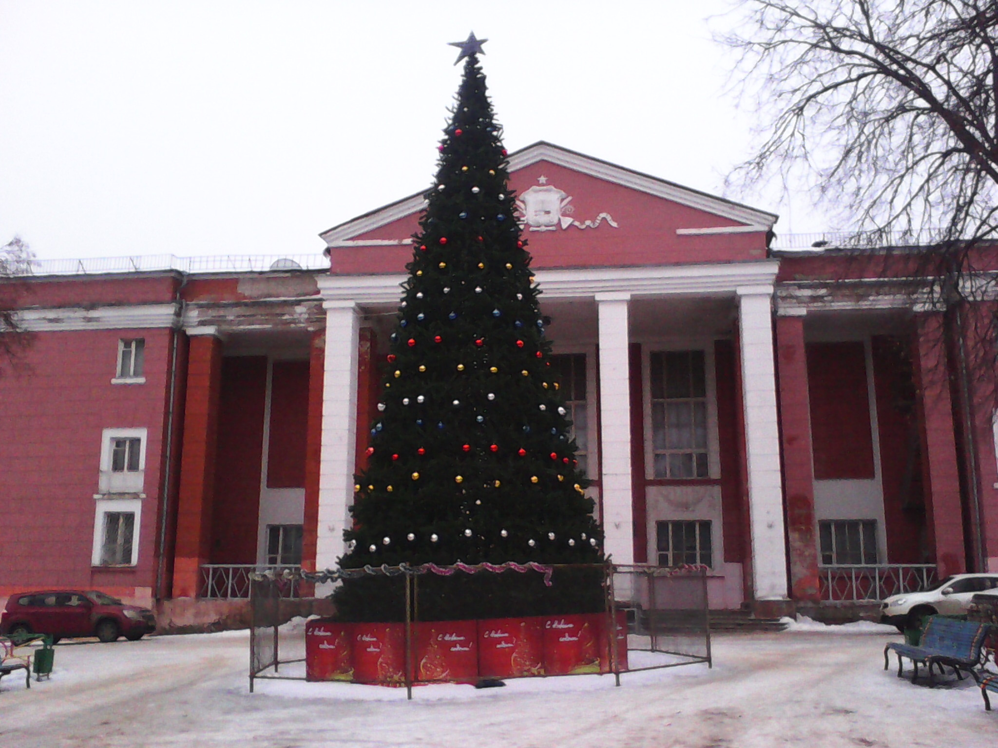 Дом Культуры Советска